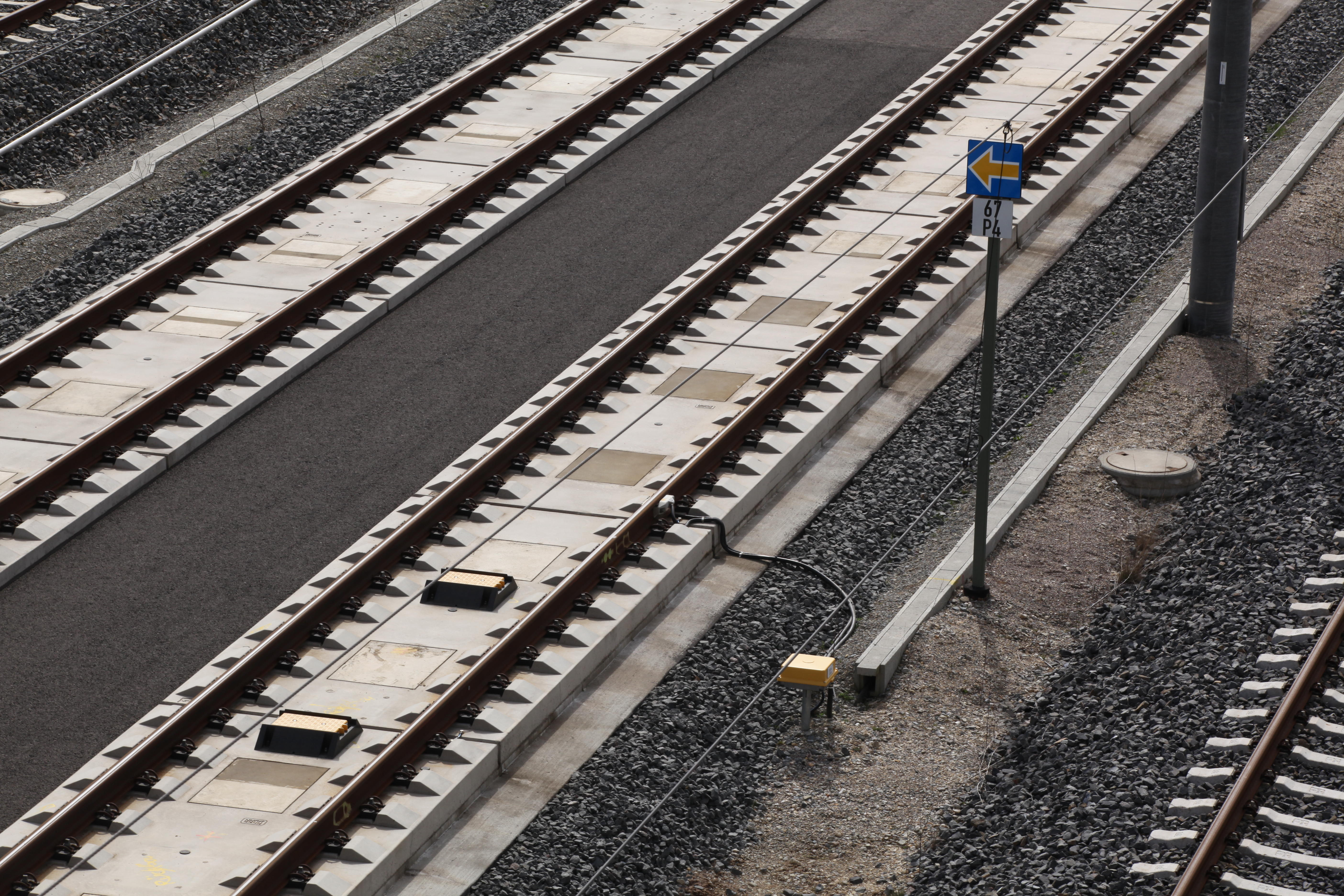 NBS Erfurt–Leipzig/Halle in Jüdendorf, Eurobalisen und ETCS-Halt-Tafel mit Kennzeichnung der ETCS-Blockstelle